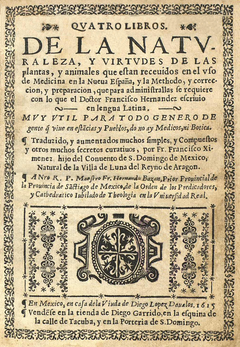 Portada del libro "Quatro libros de la naturaleza y virtudes de las plantas y animales" de Francisco Hernandez escrito en latín, y traducido al español por Francisco Ximenez en 1615.